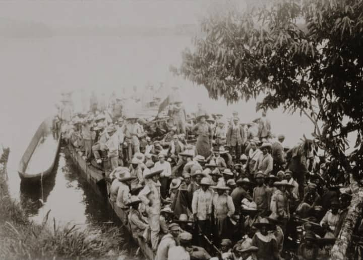 Tropas colombianas embarcándose en pequeños botes para ir al combate de Gueppi desde el río Putumayo